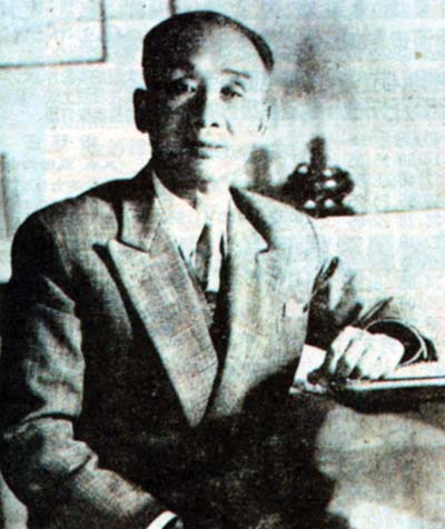 陳公哲，中国近代武学家。精武體育會創辦人。